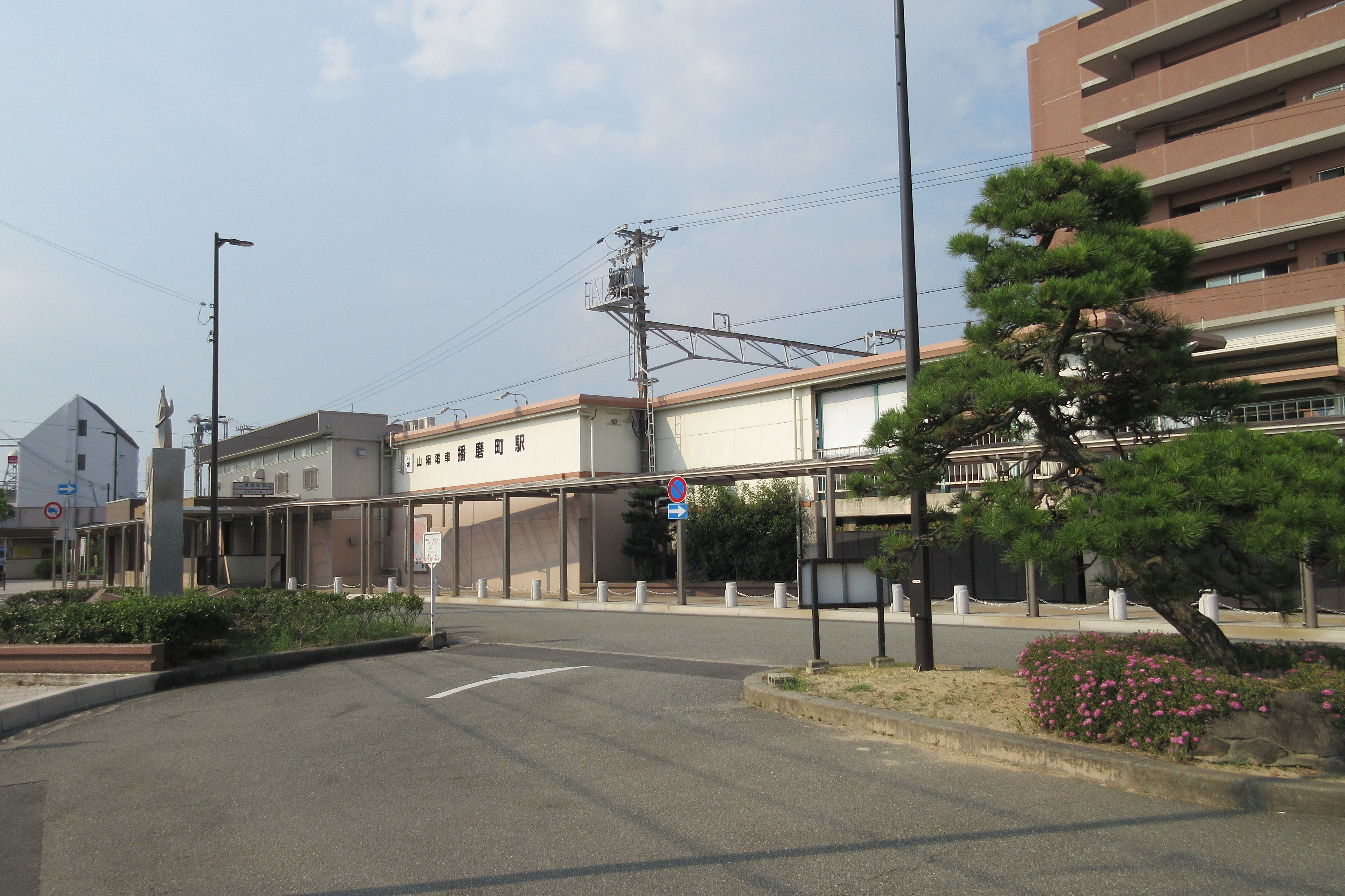 山陽電鉄播磨町駅